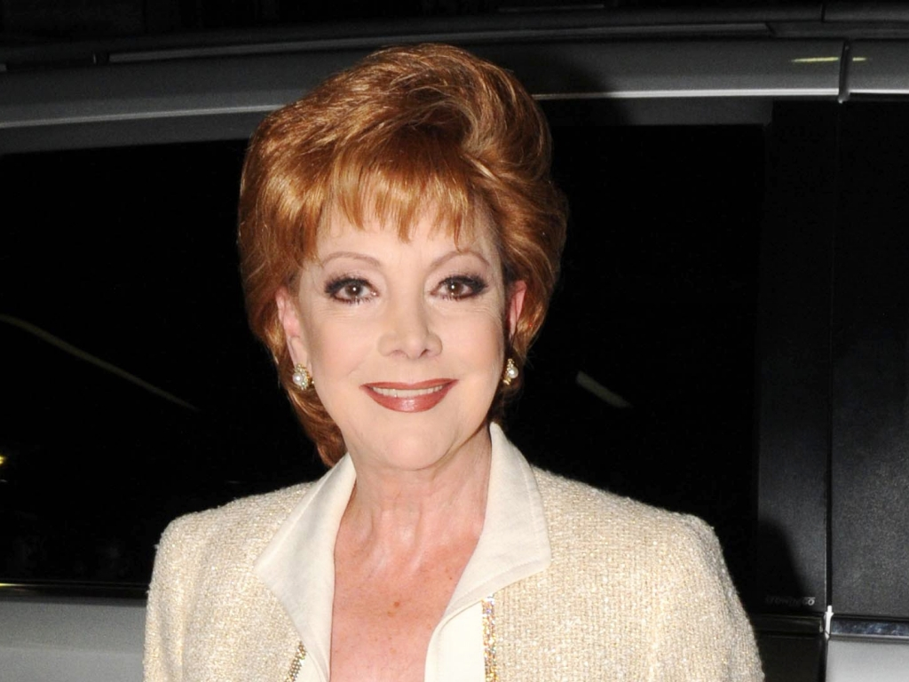 Jacqueline em 2015